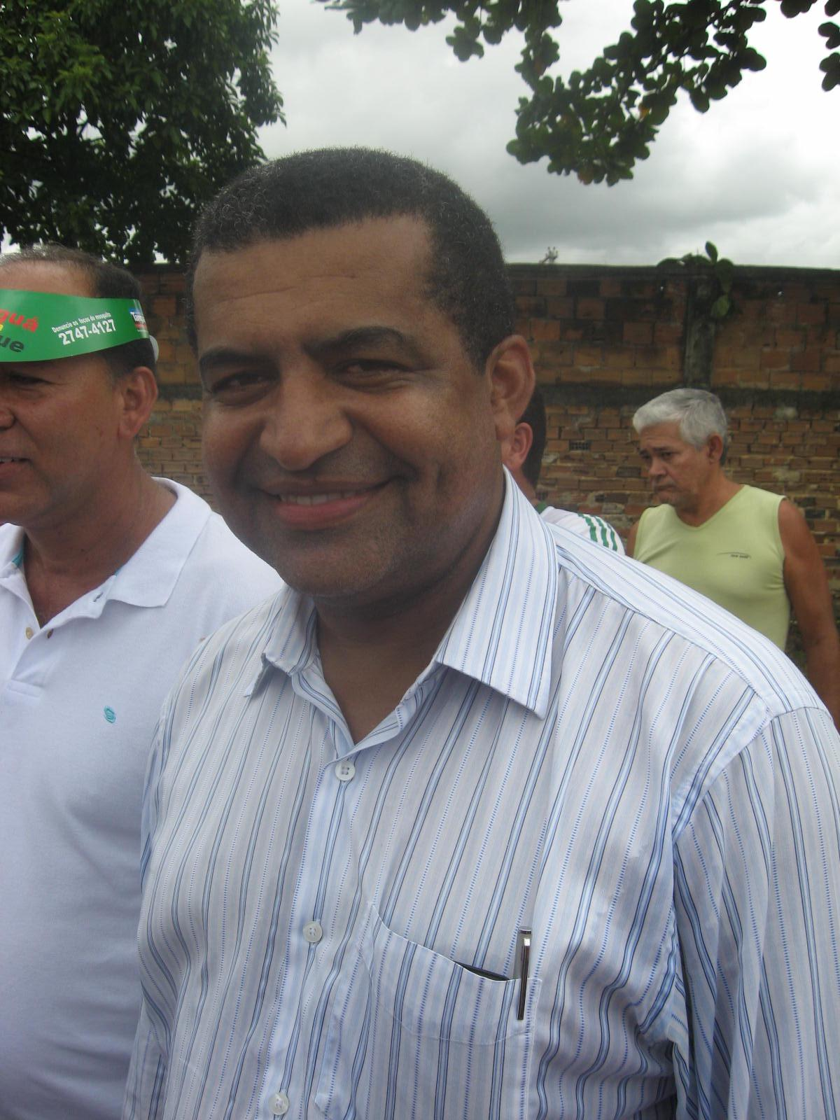 Edmílson Valentim, deputado federal do PC do B, do Rio de Janeiro.